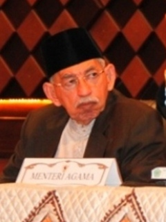 Ketua Komisi Ukhuwah Islamiyah Majelis Ulama Indonesia Prof. Dr. K.H. Umar Shihab saat memimpin pelaksanaan Sidang Itsbat Penetapan Awal Syawal 1434 H di Gedung Kementerian Agama, Jakarta.